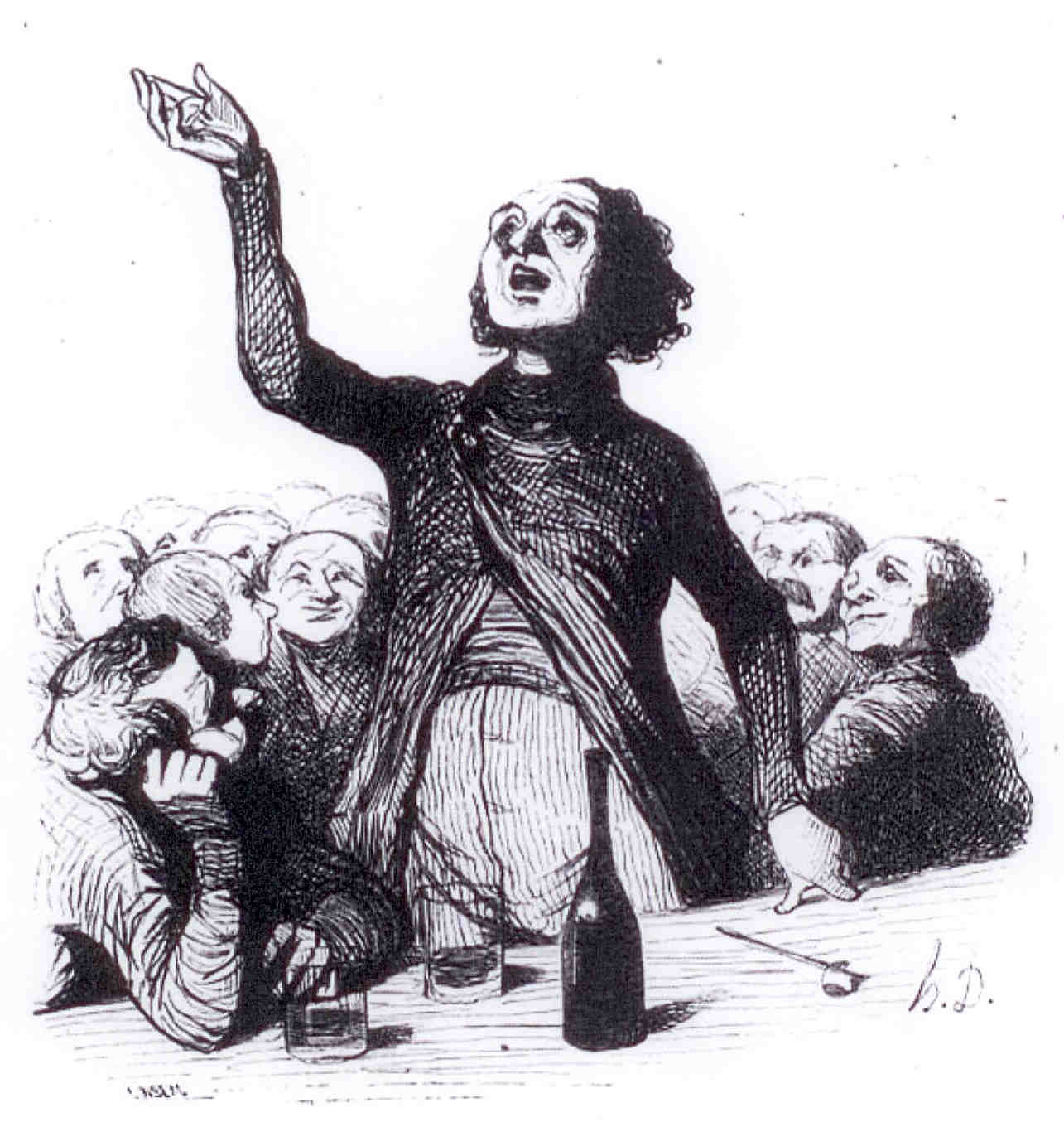 Un goguettier à Paris.